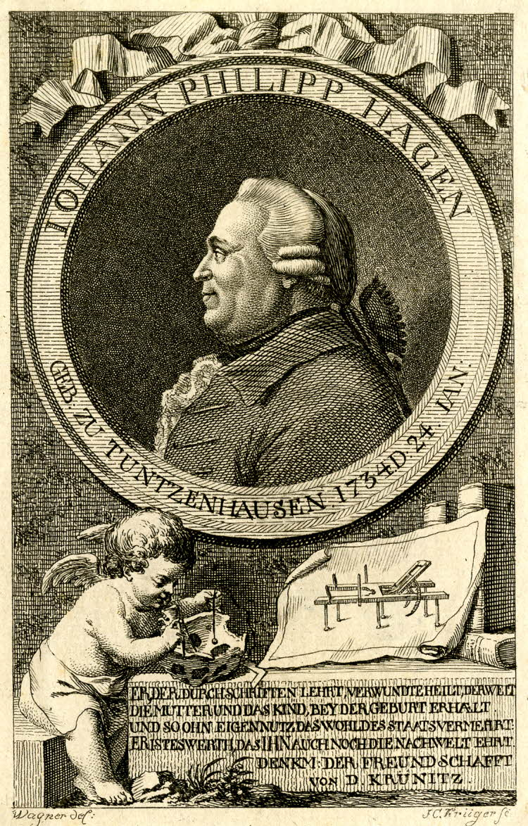 Porträt Johann Philipp Hagen - J.C. Krüger sc.